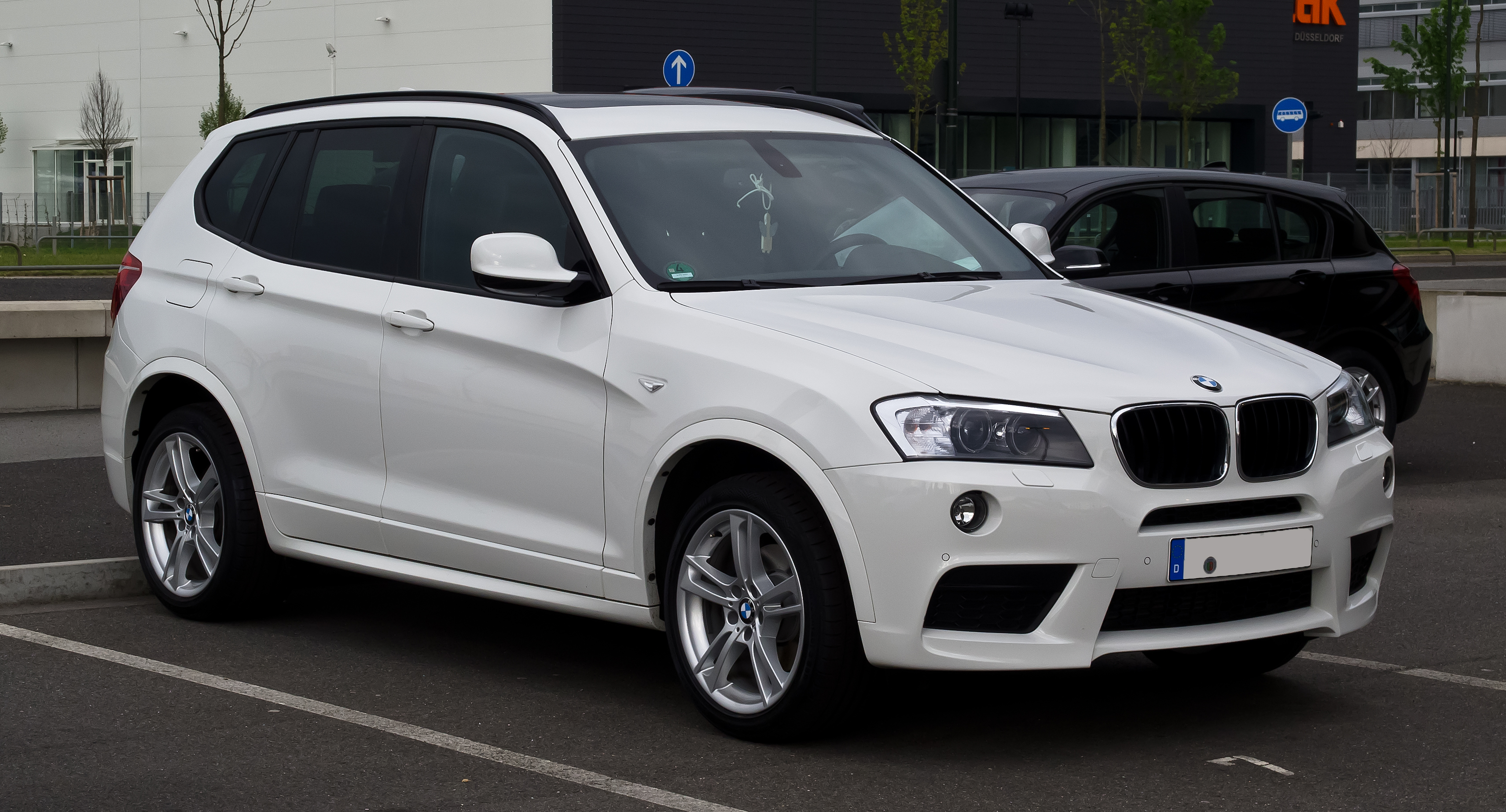 BMW X3 M-Sportpaket (F25)